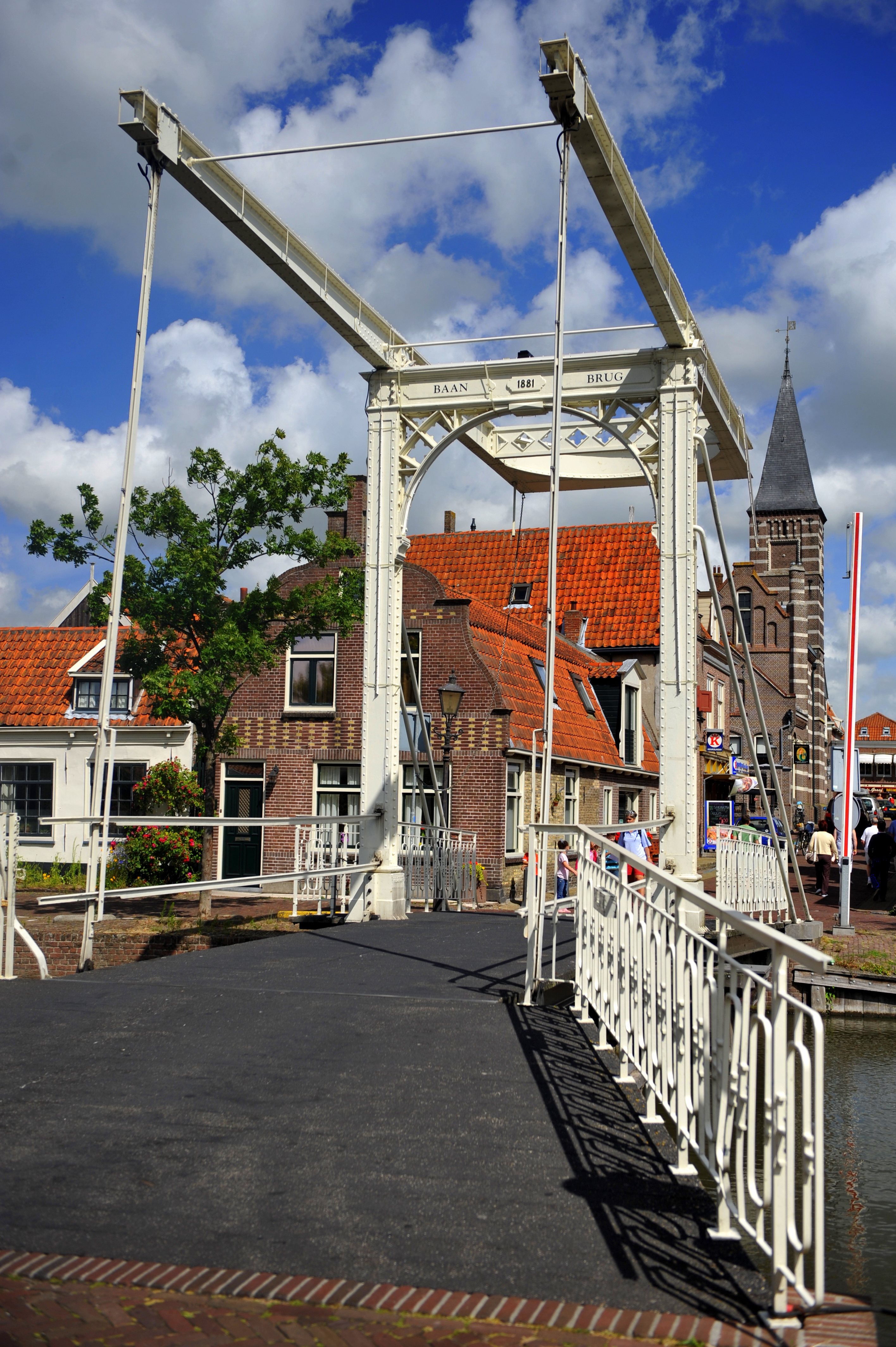 Edam - een stad in de provincie Noord-Holland